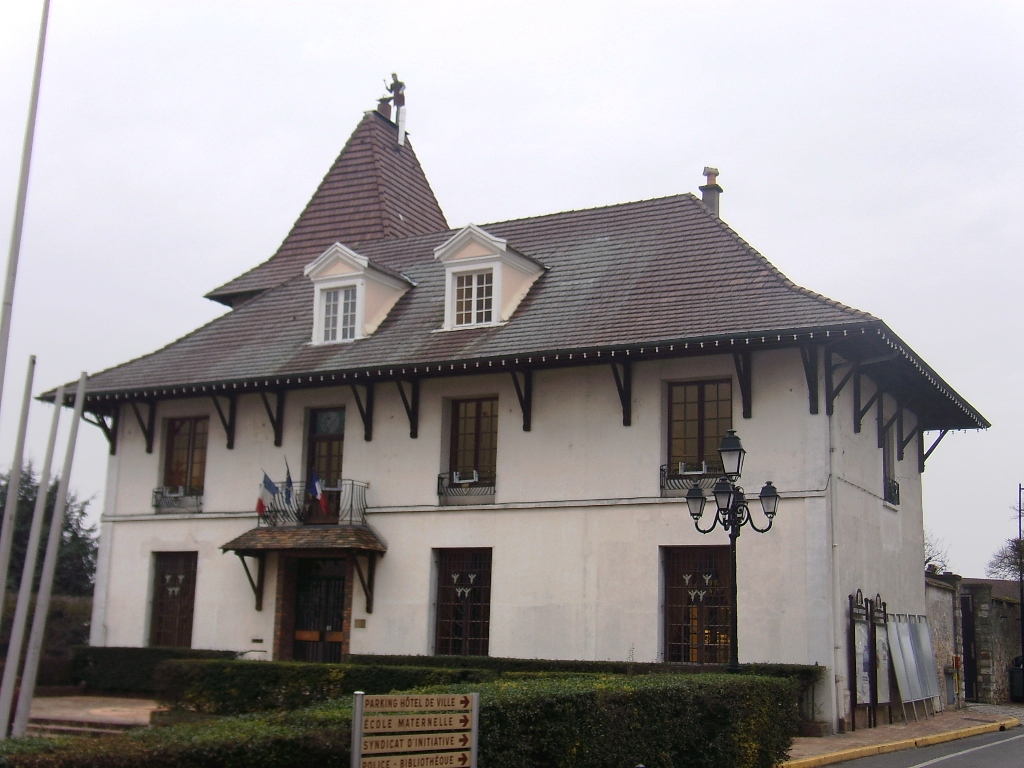 Hôtel de Ville de Montlhéry .